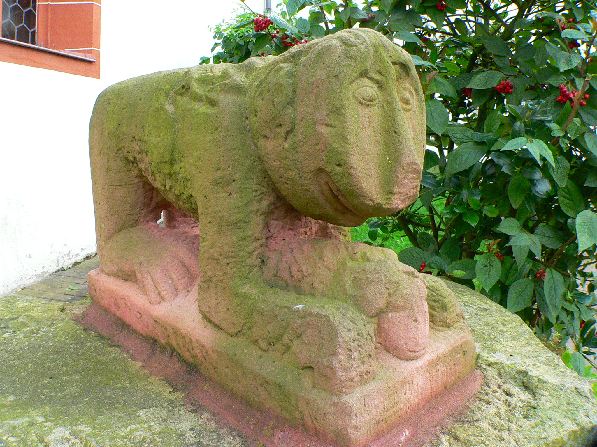 Kloster Höchst im Odenwald (Deutschland): "Kauernder Löwe mit Lamm", Original von 1200 im Hessischen Landesmuseum Darmstadt